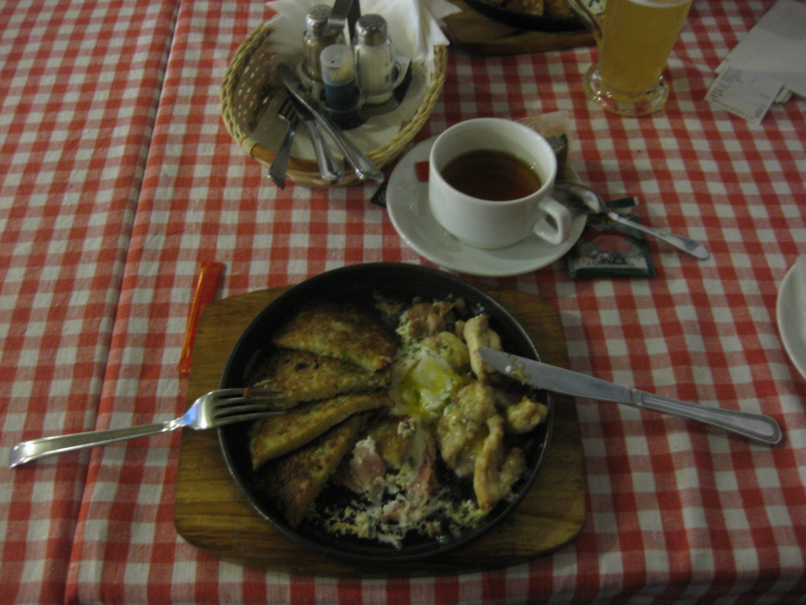 Обед в кафе в Минске.